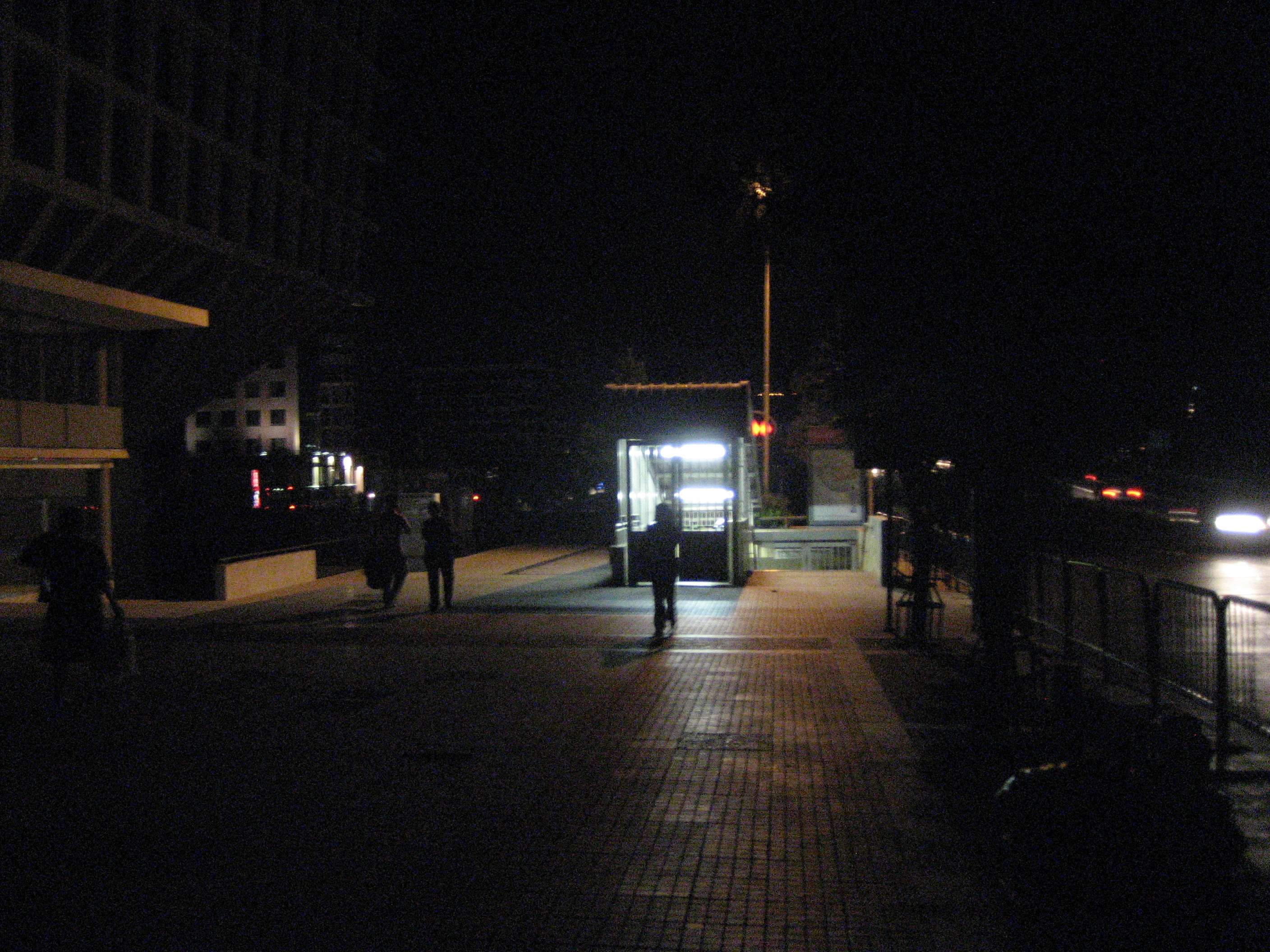 Acceso a la estación Escuela Militar del Metro de Santiago durante el apagón del 14 de marzo de 2010.